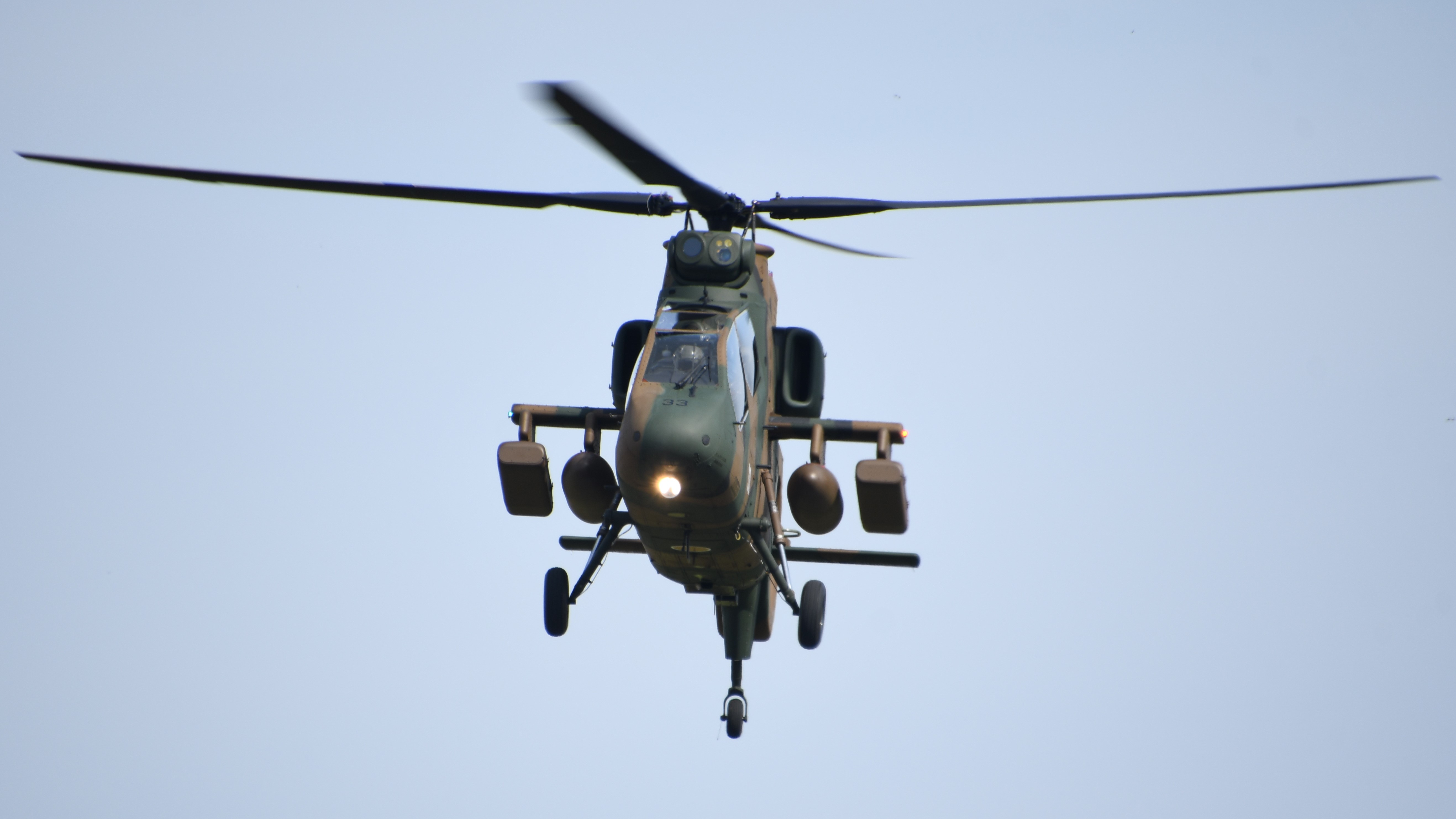 陸上自衛隊 飛行するOH-1観測ヘリコプター（32633号機）。2019年11月3日 明野駐屯地にて。